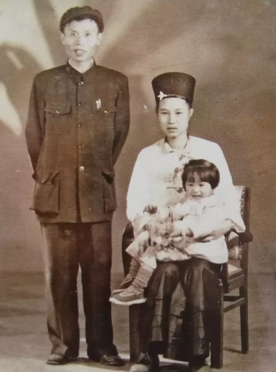 中文（中国大陆）: 勐卯末代土司衎景泰、衎玉兰夫妇与女儿